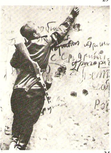 Soldato sovietico impegnato a lasciare una scritta-ricordo su un muro del Reichstag di Berlino